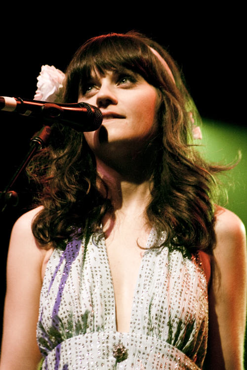 Terminal 5, NYC